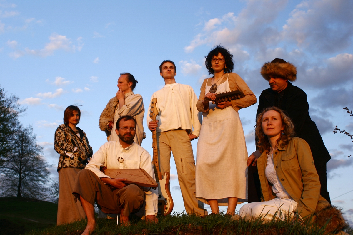 Grupė Atalyja Markučiuose (2005). Trūksta narių: Ernesto Jepifanovo, Salvijaus Žeimio